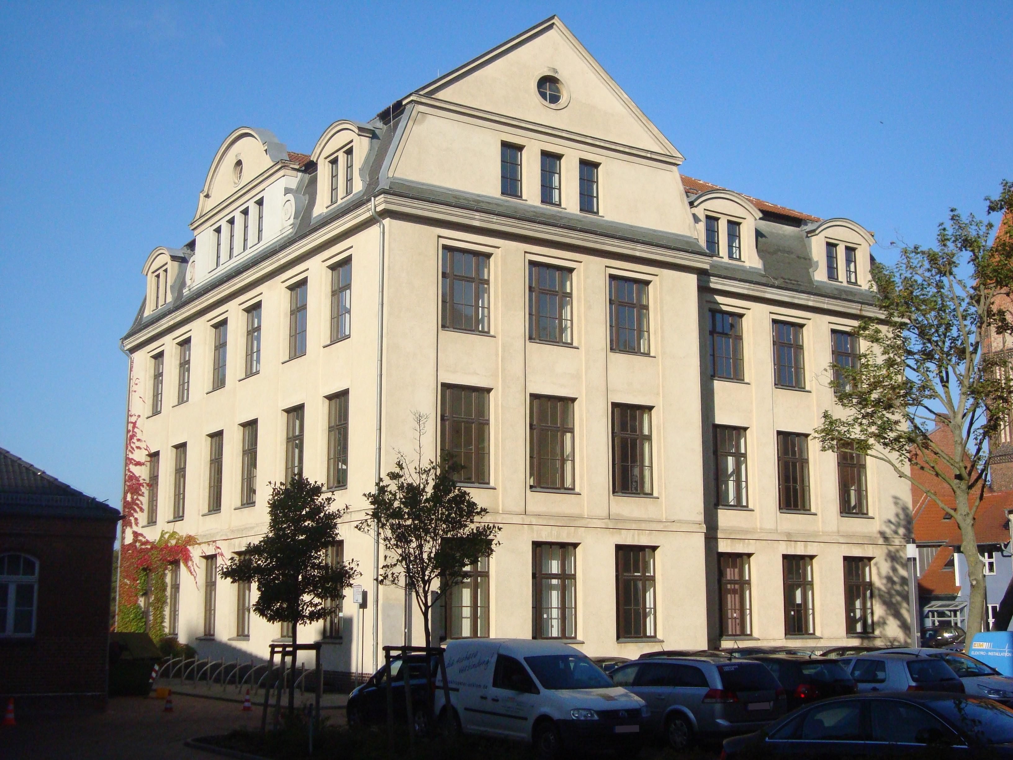 Historisches Institut in der Domstraße 9a in Greifswald.